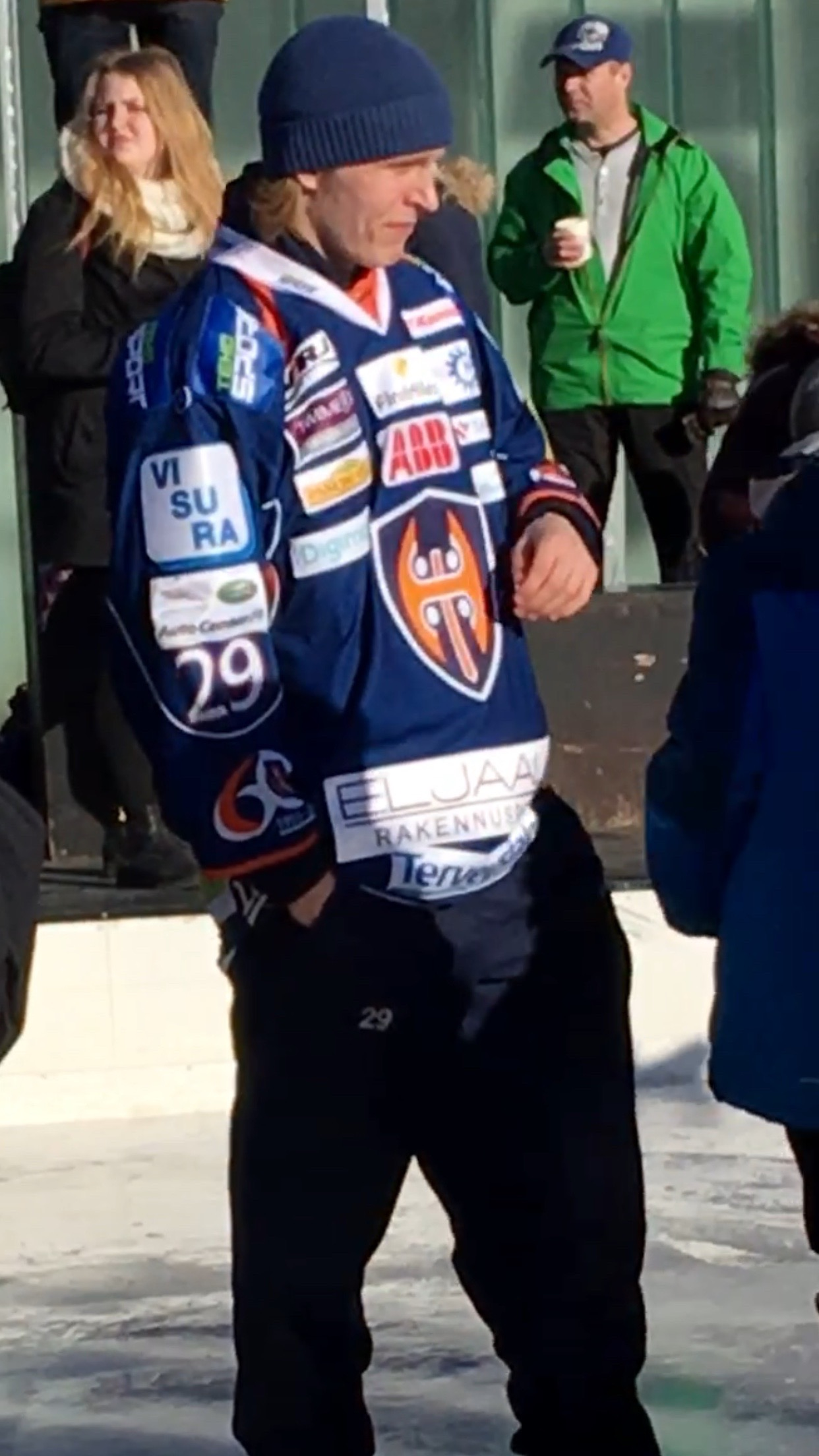 Jääkiekkoilija Patrik Laine Helsingin Rautatientorilla maaliskuussa 2016.